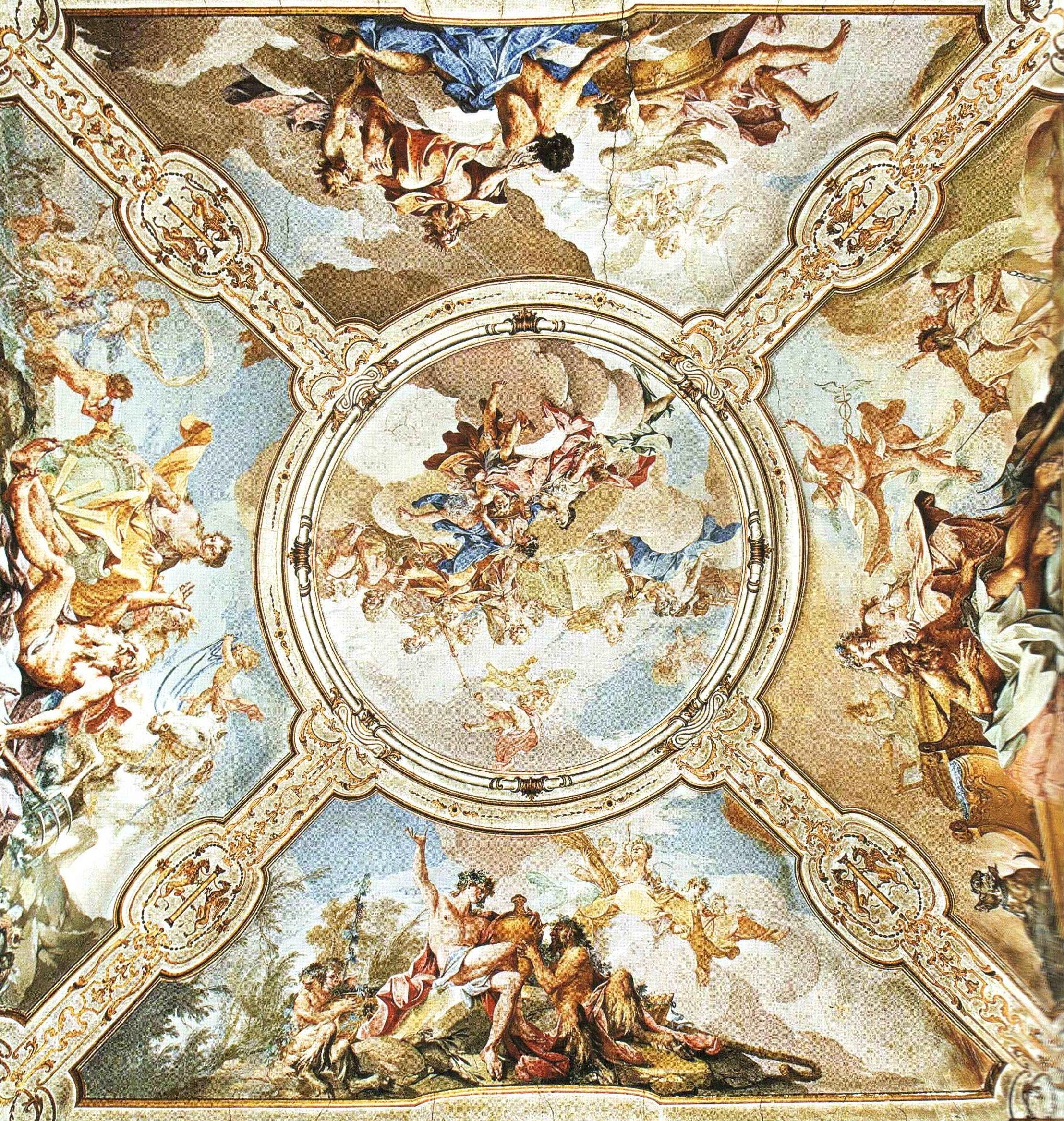 Convito per le nozze di Amore e Psiche, affresco nel Palazzo Sanvitale di Parma.